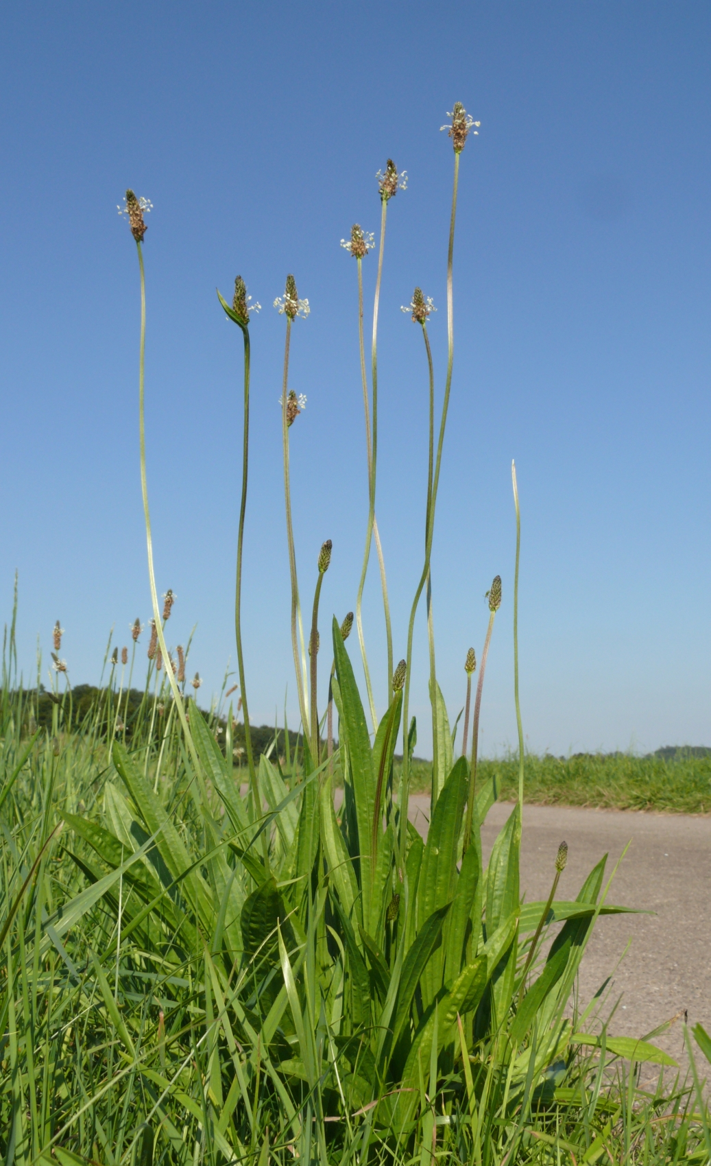 Plantage lanceolata, Schwäbisch-Fränkische Waldberge, Germany